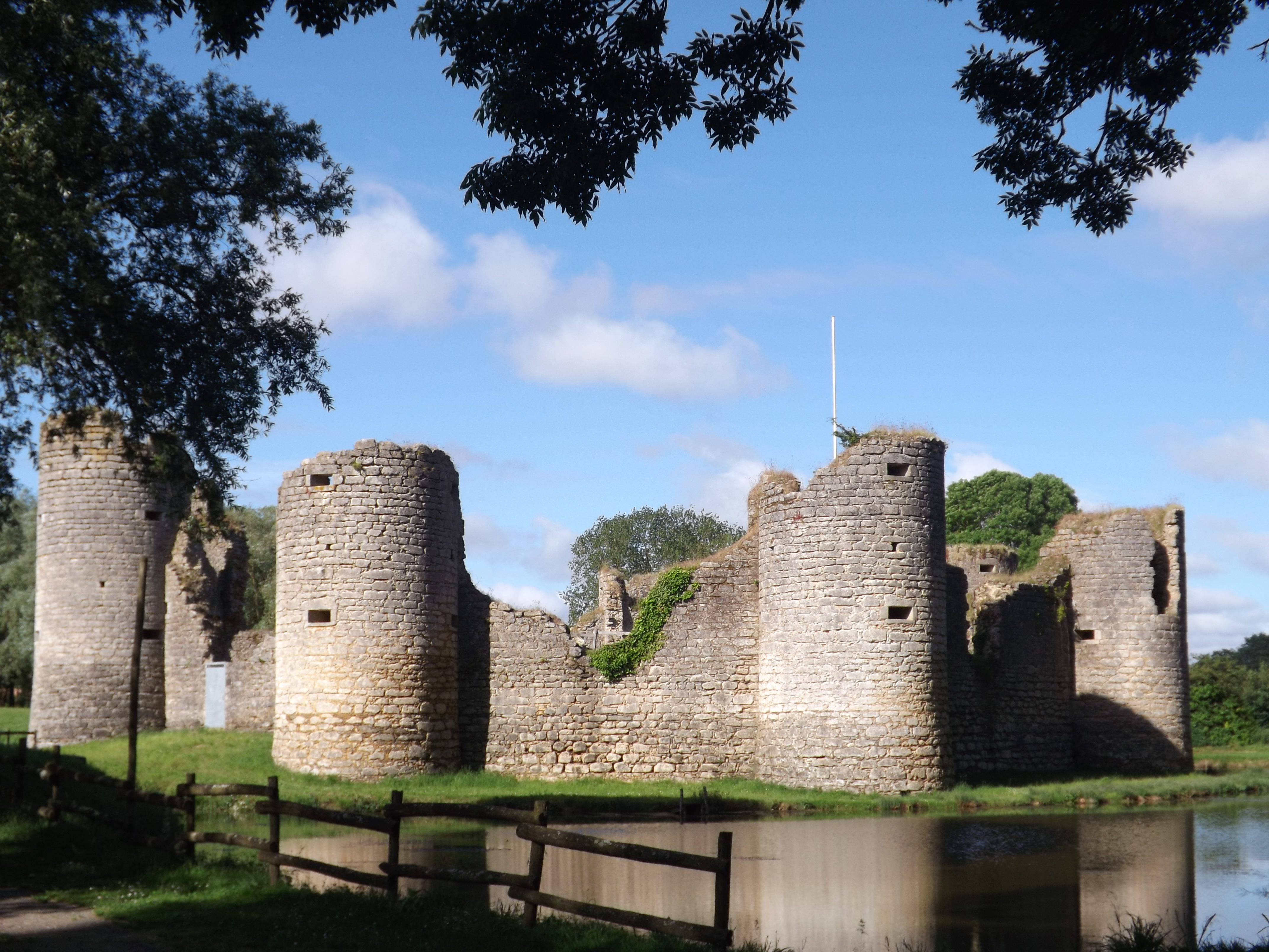 Château de Commequiers (Inscrit) .